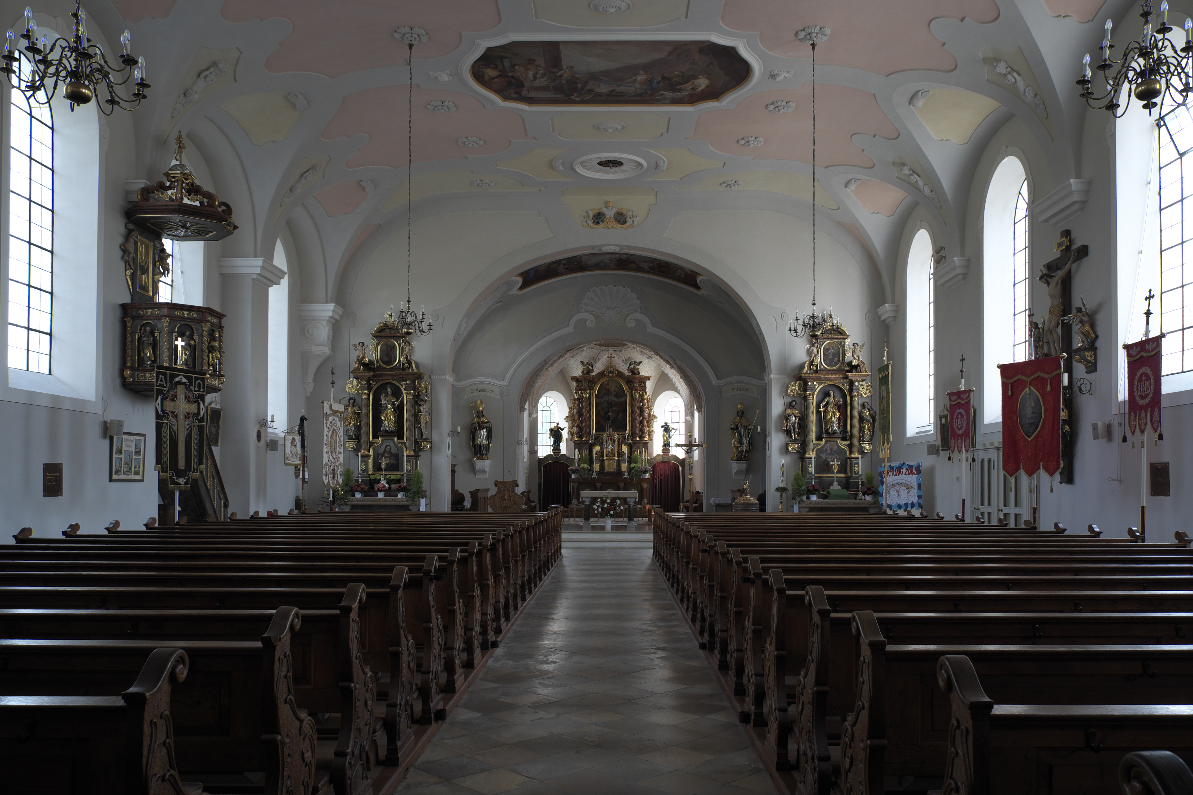 Katholische Pfarrkirche St. Vitus in Maisach im Landkreis Fürstenfeldbruck (Bayern/Deutschland), Innenraum